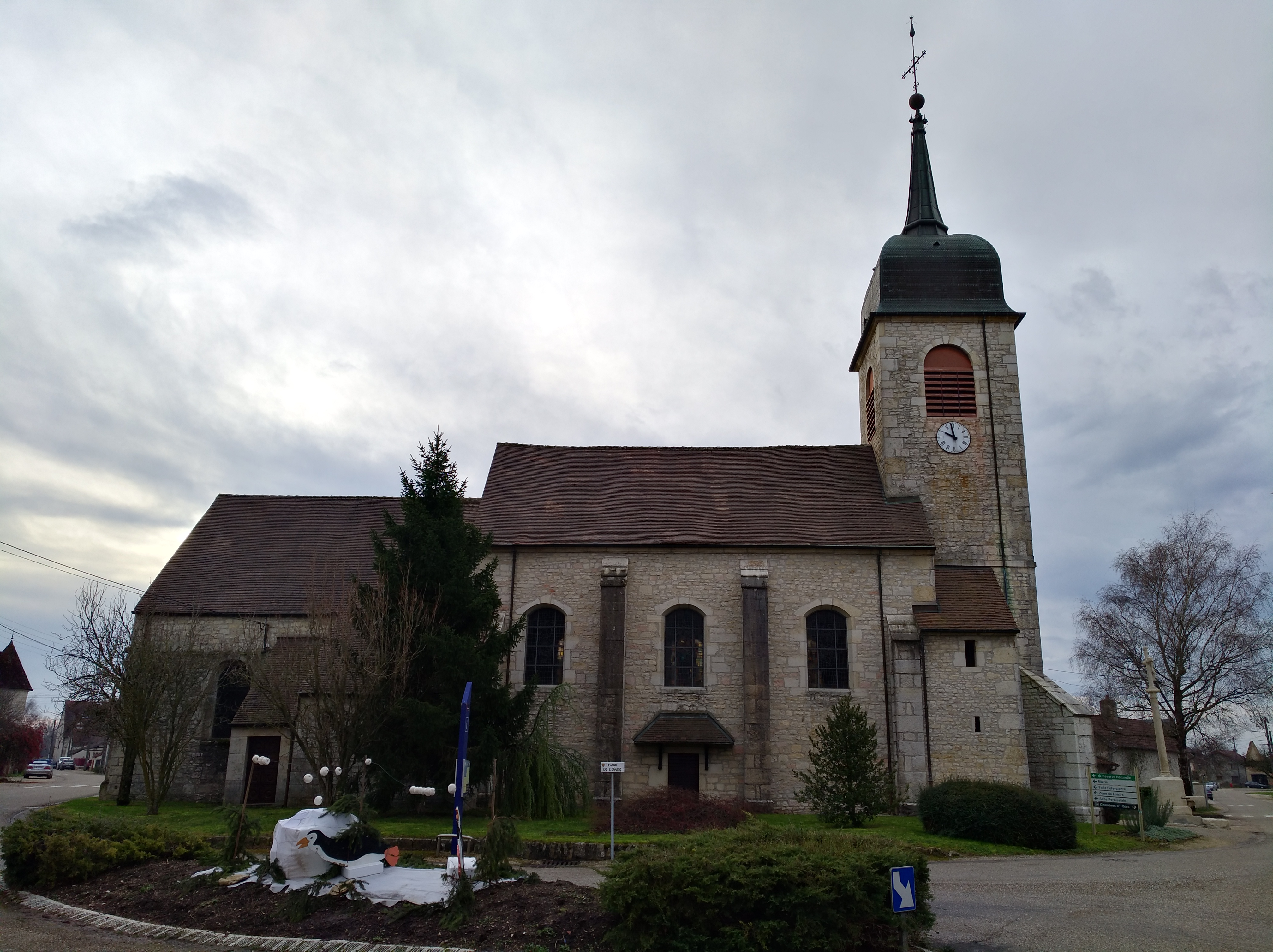 Gevry (Jura, France) en janvier 2018.